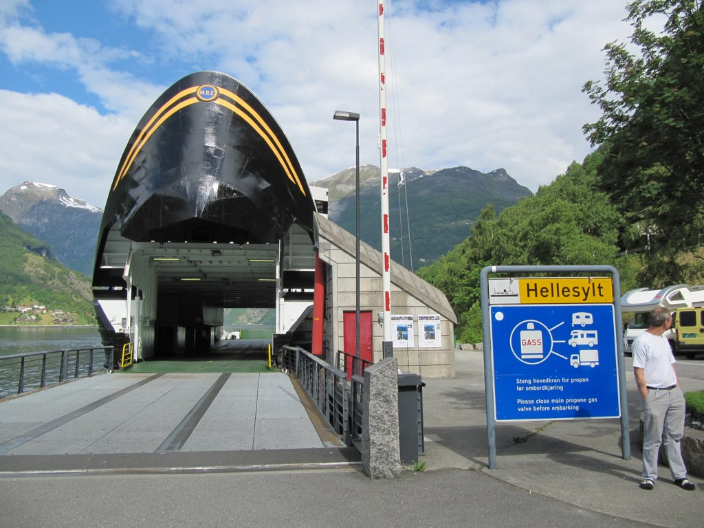 Veerboot Geiranger - Hellesylt